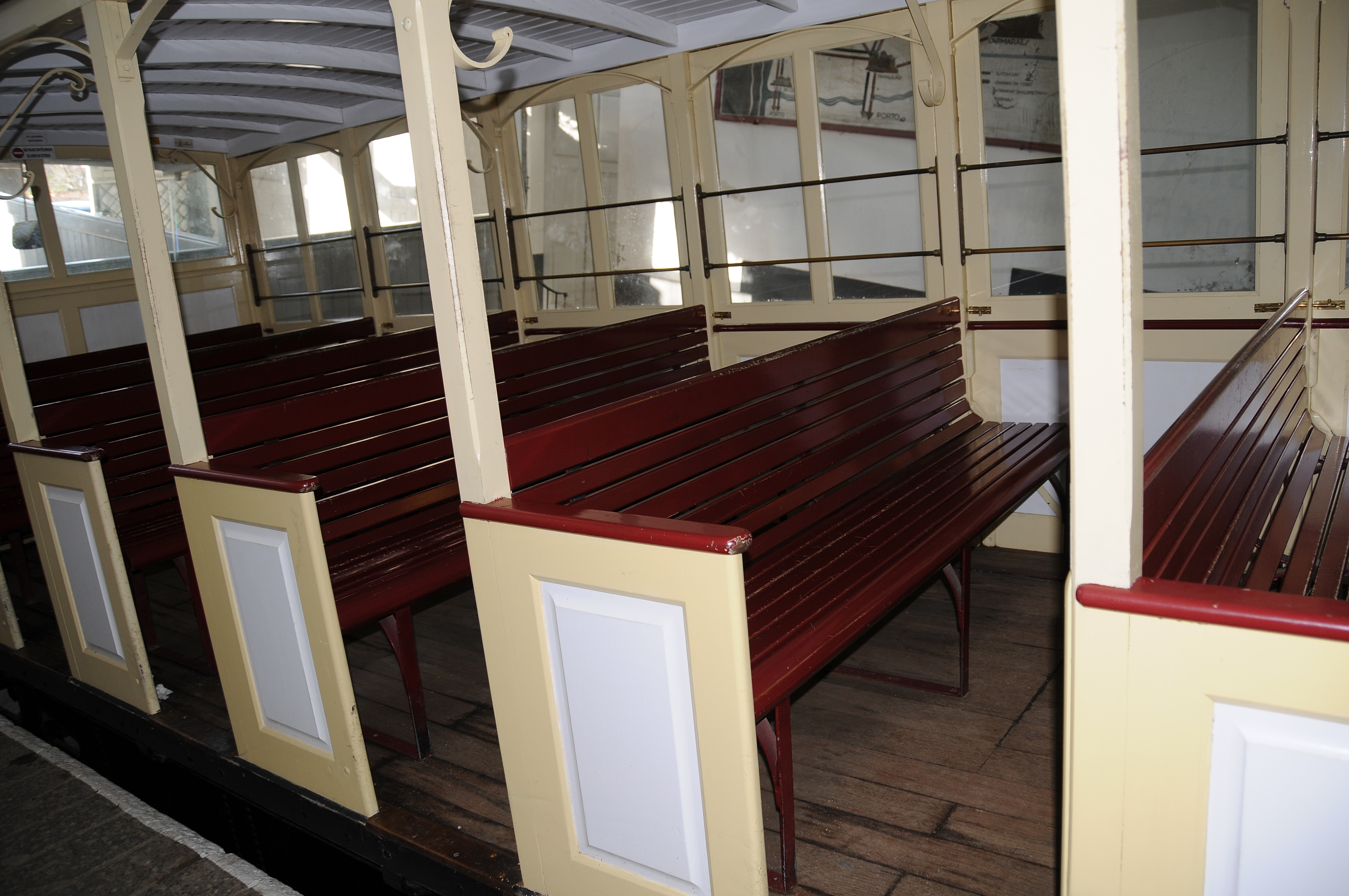 Bom Jesus, in Braga, Portugal.